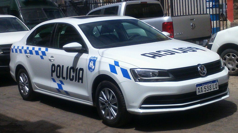 Patrullero Volkswagen de la policía jujeña